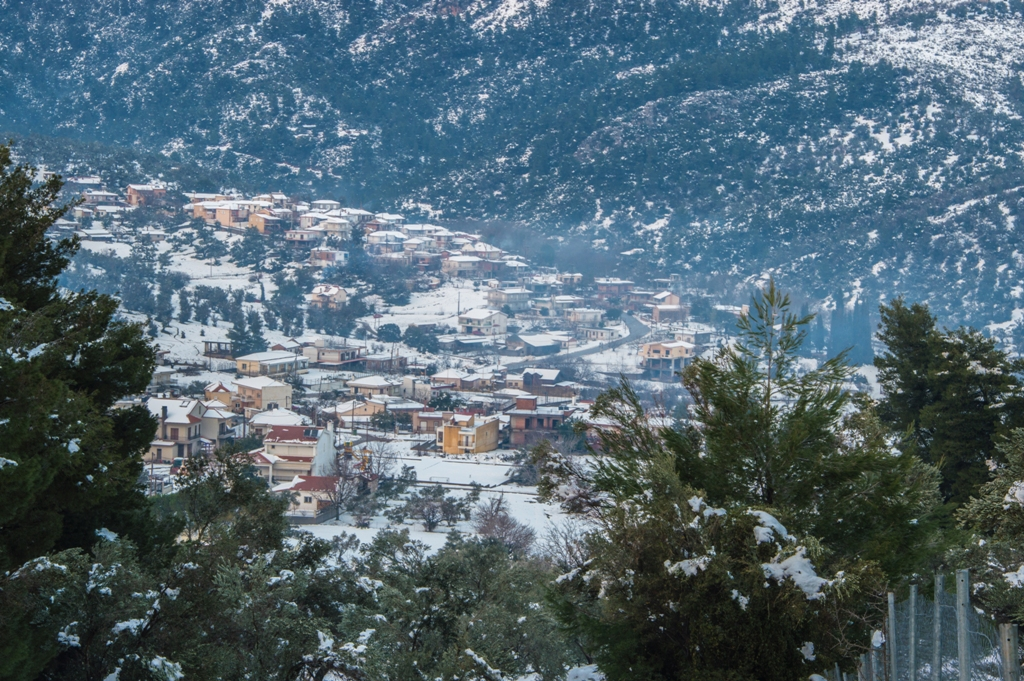 Το χωριό στα λευκά